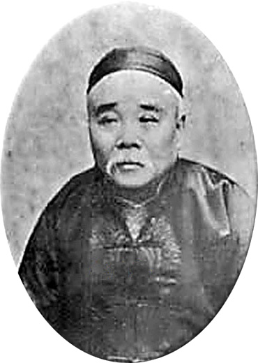 賴際熙（1865年－1937年），字煥文，號荔垞，廣東增城（今增城市）湖塘埔人。晚清進士，學者。